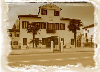 Villa Gasparini XVII c.- Italy - Riviera del Brenta (Venice)